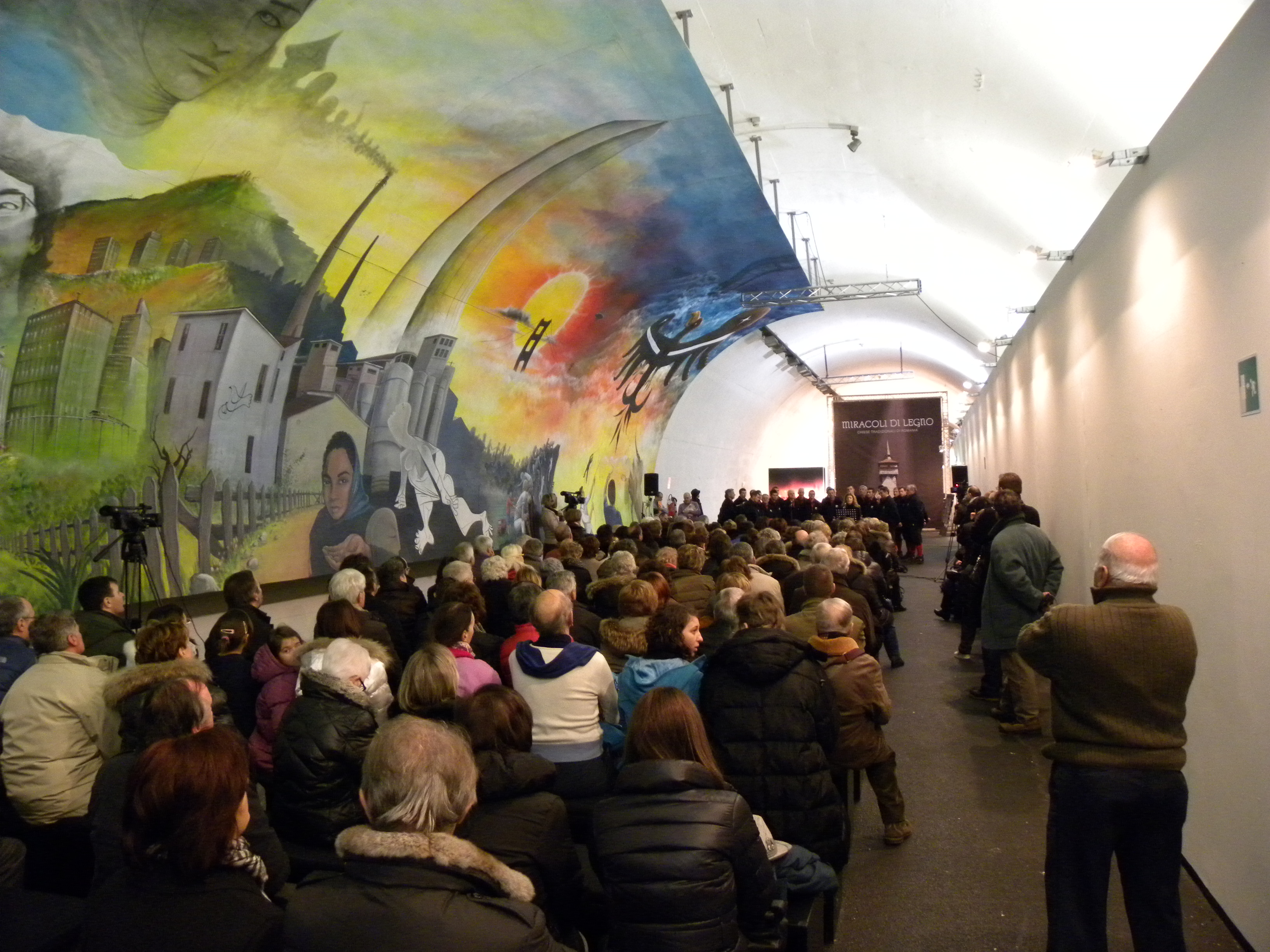 Gallerie di Piedicastello This is a photo of a monument which is part of cultural heritage of Italy.